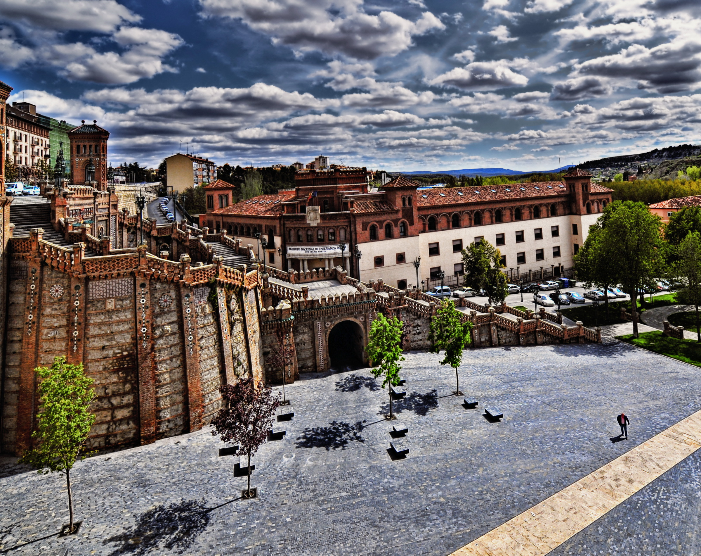 La influencia de la arquitectura mudéjar en el patrimonio turolense, es sumamente importante, como se puede comprobar en esta escalinata, construida entre 1920 y 1921 en estilo claramente neo-mudéjar. Sin embargo, pese a las bellas formas que posee, el ascenso de sus numerosos escalones es un tanto fatigoso, lo cual no impide admirar su grandeza y majestuosidad. Fue ideada, para unir la estación de ferrocarriles, ubicada en la parte baja de Teruel, con el casco histórico, salvando así el fuerte desnivel existente.